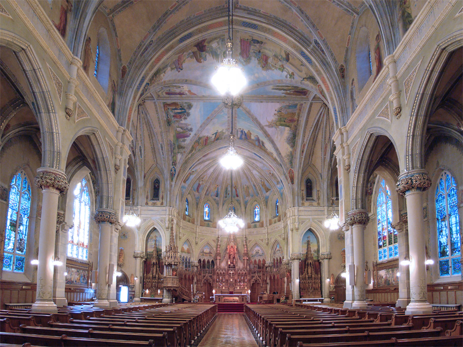 Église Saint-Viateur d'Outremont, Montréal, Québec, Canada.